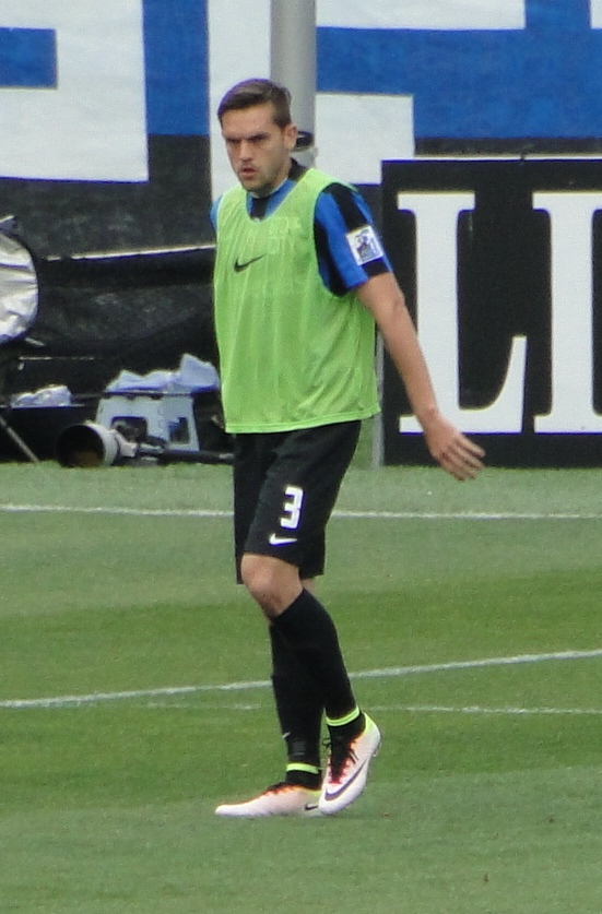 Rafael Tolói, calciatore brasiliano